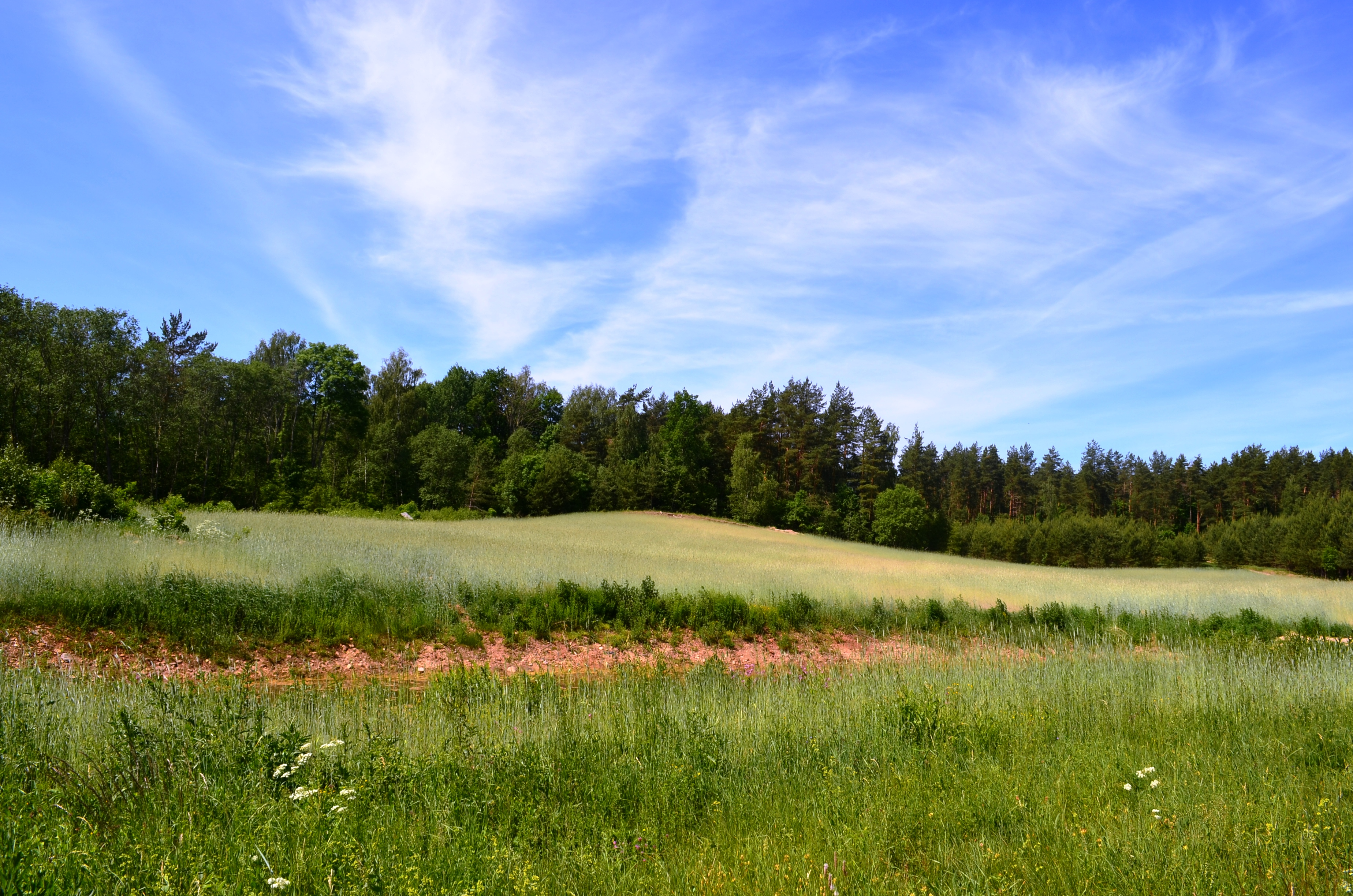 Asvejos regioninis parkas, kraštovaizdis Jonėnuose, Vilniaus r.